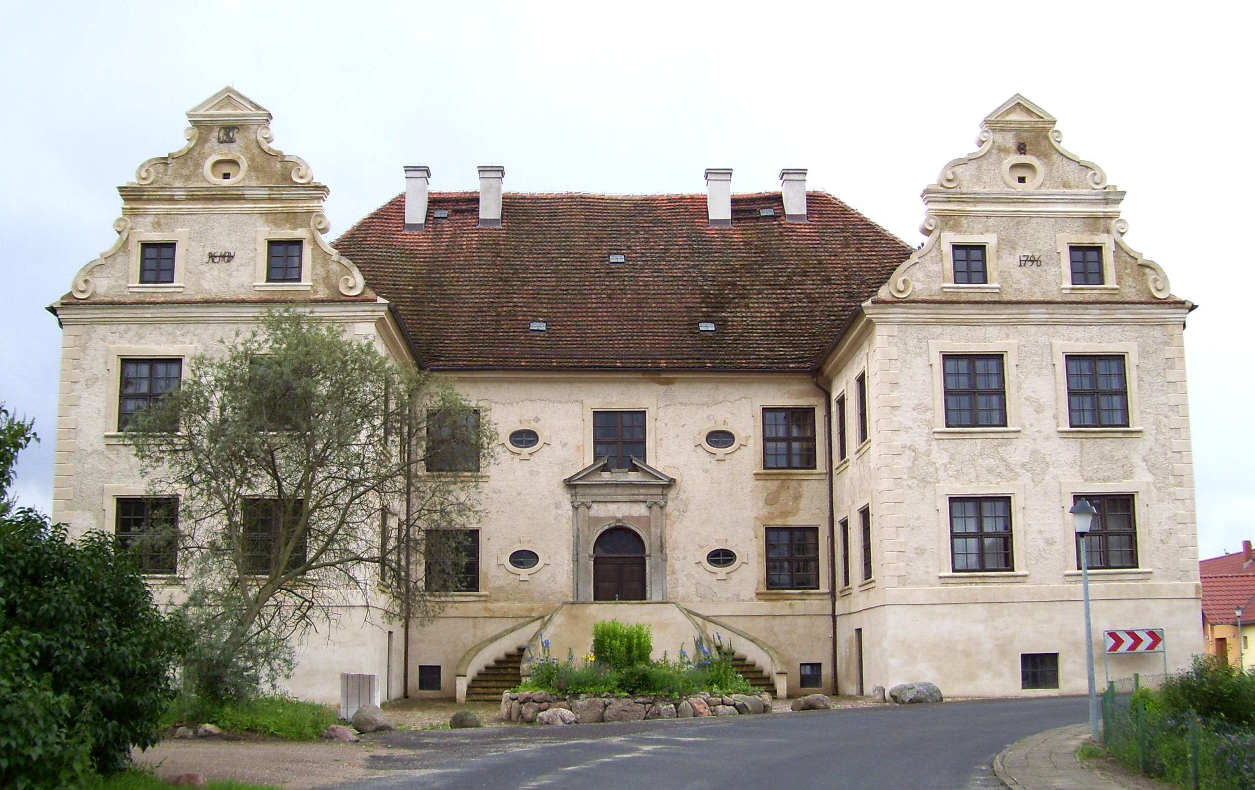 Schmarsow Landkreis Demmin - Schloss Schmarsow - Nordseite